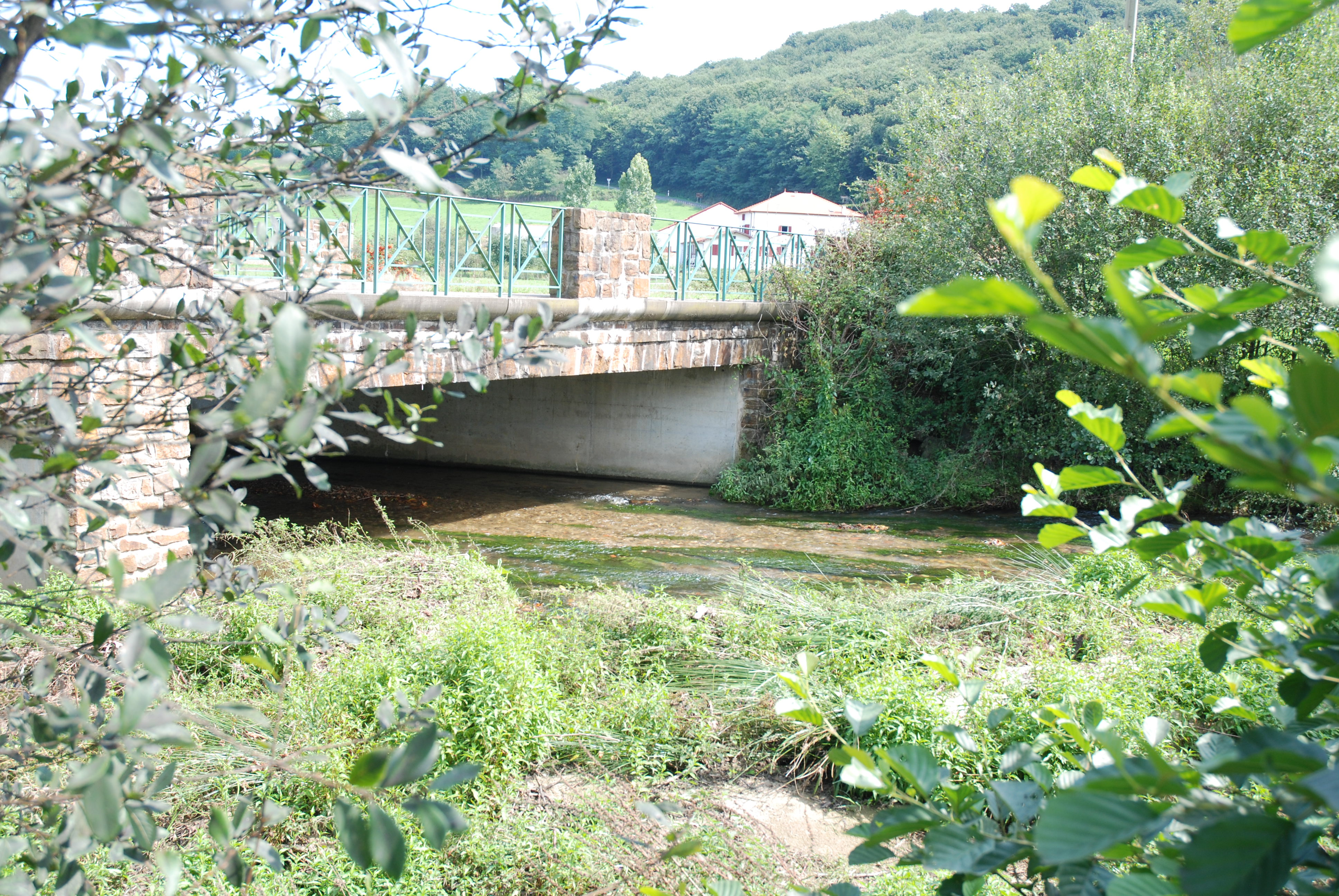 Mendionde, pont sur la Joyeuse